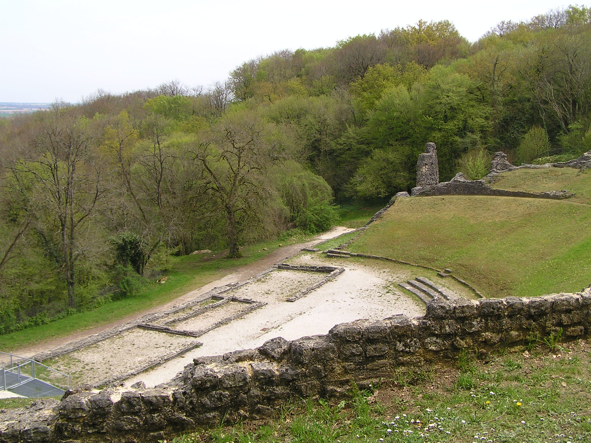 théâtre gallo-romain des Bouchauds